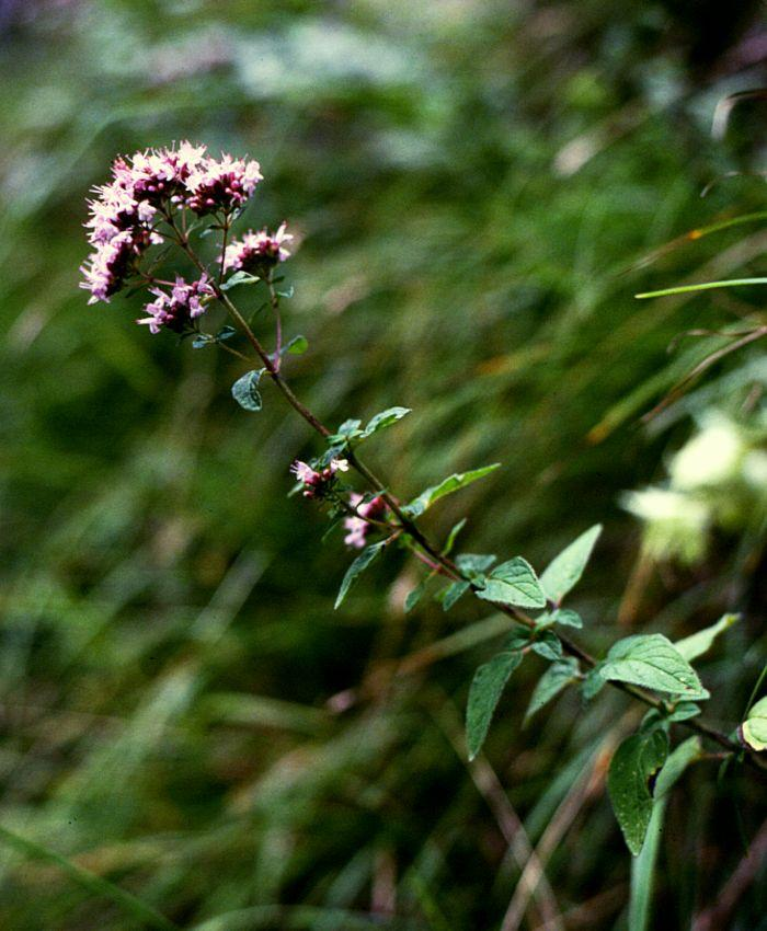 Echter Dost (Origanum vulgare), Lippenblütler (Lamiaceae) - Österreich/Austria/Autriche: Niederösterreich, Erlauftal E Gaming, Vordere Tormäuer, Toter Mann